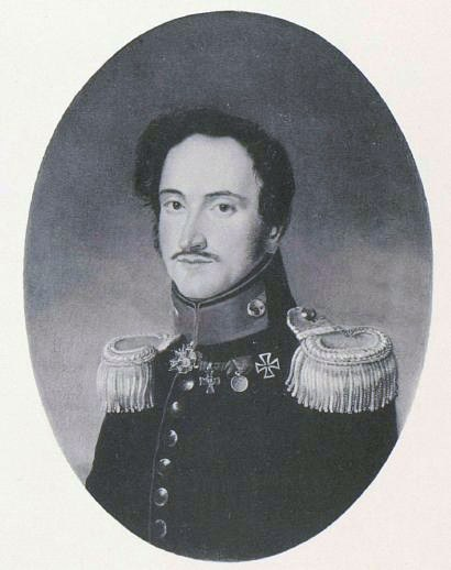 Василий Николаевич Ладомирский (1785-1847), сын И.Н.Римского-Корсакова и Е.П.Строгановой, камергер.